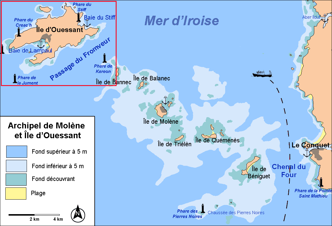 Description : Île d’Ouessant et archipel de Molène Place : Bretagne, France Date : Août 2006 Author : Réalisation Pline